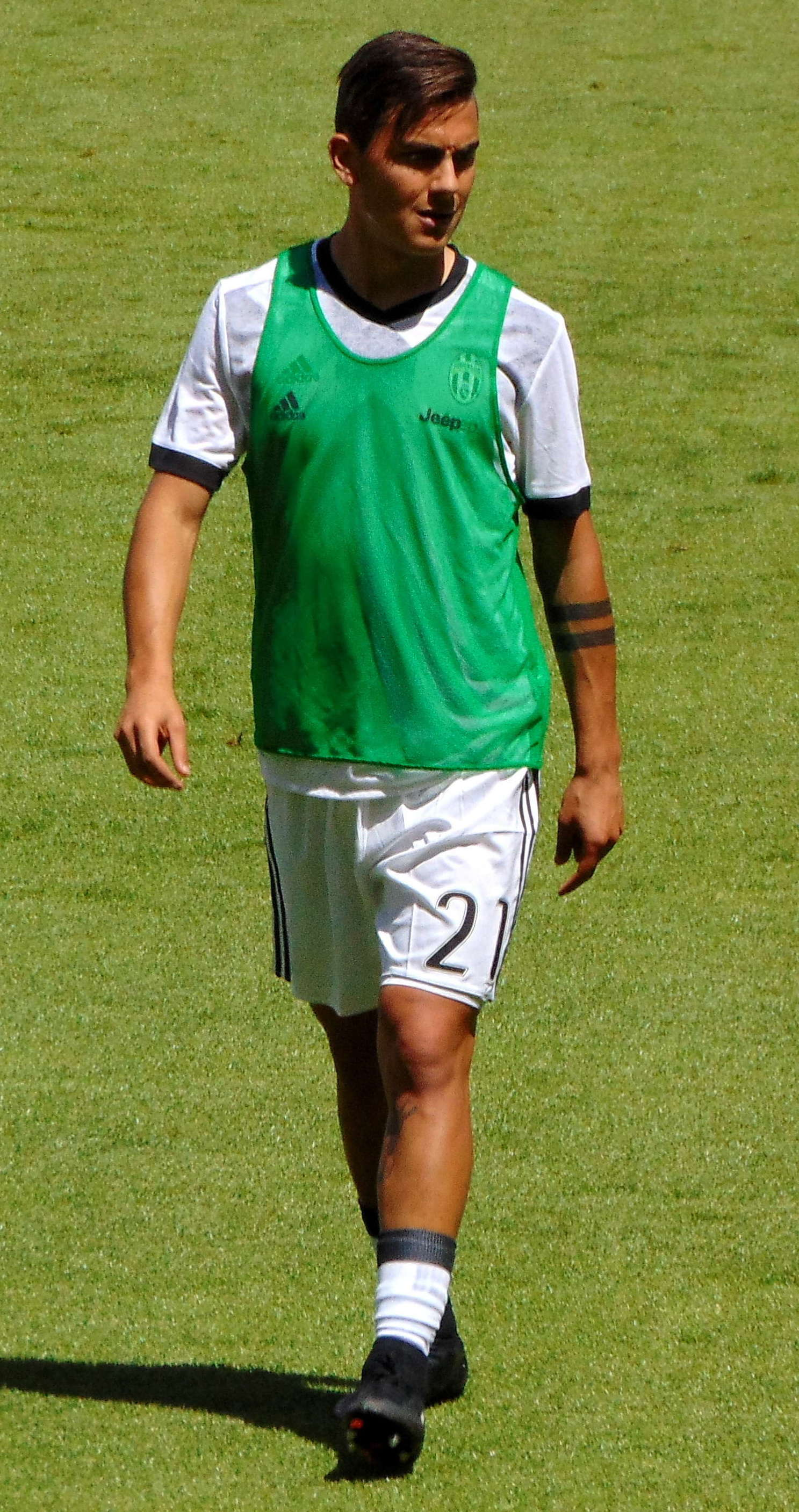 Torino, Juventus Stadium, 21 maggio 2017. Il calciatore della Juventus, Paulo Dybala, in riscaldamento prima della vittoriosa sfida interna contro il Crotone (3-0) valevole per la 37ª giornata del campionato italiano di Serie A 2016-17.